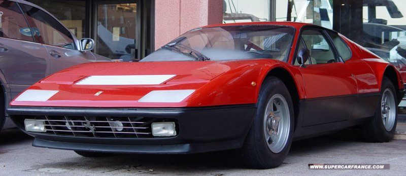 Ferrari 365 GT4 BB Zustimmung zum Posting in Wikipedia unter CreativeCommons-Lizenz per Mail vom 16.2.2006